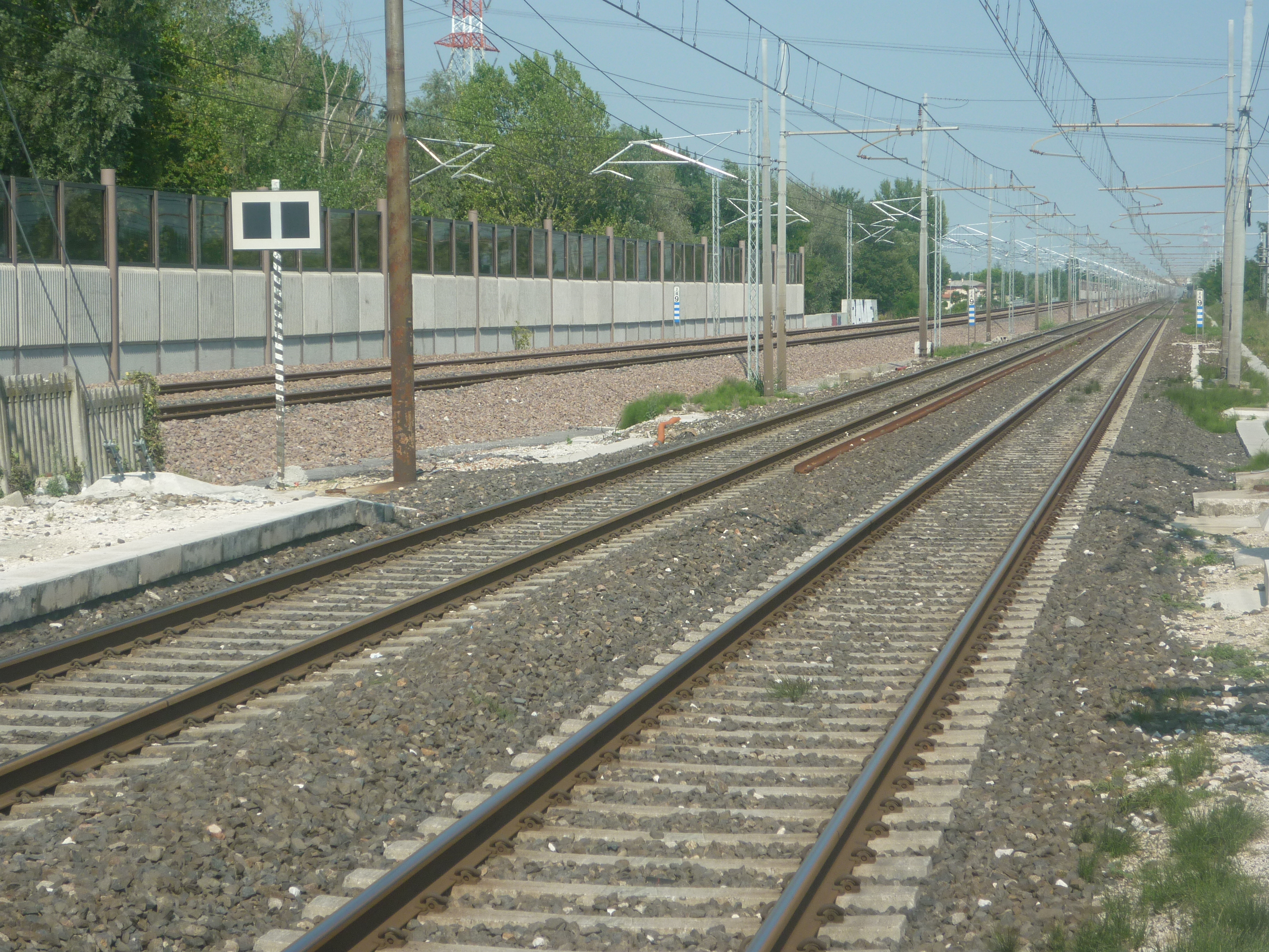 fs